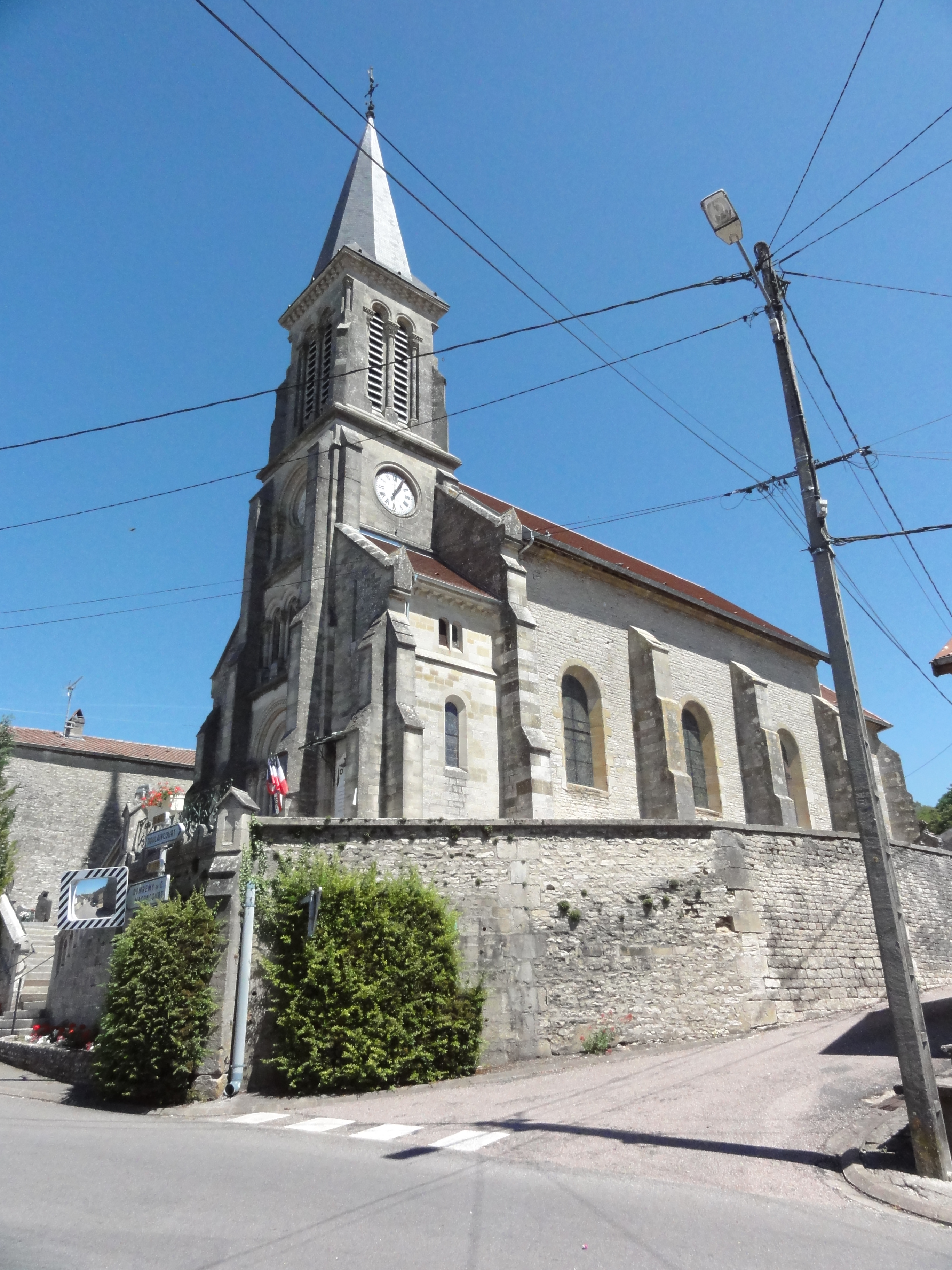 Saucourt-sur-Rognon, église Saint-Rémy